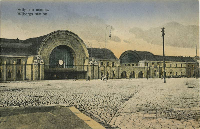 Здание ж/д вокзала в Выборге